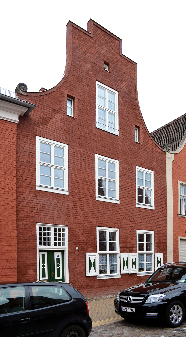 Traufenhaus im Holländischen Viertel in Potsdam